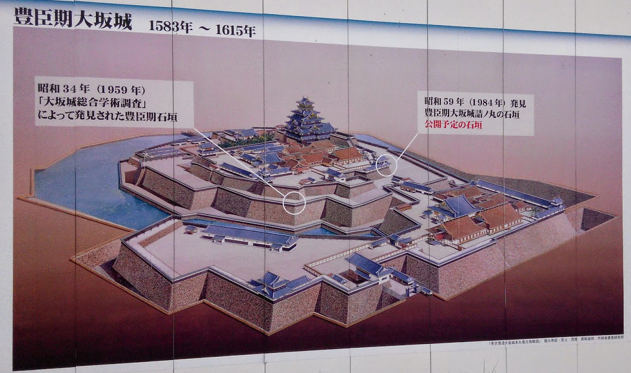 Plan du château de Osaka telle qu'il était de 1583 à 1615